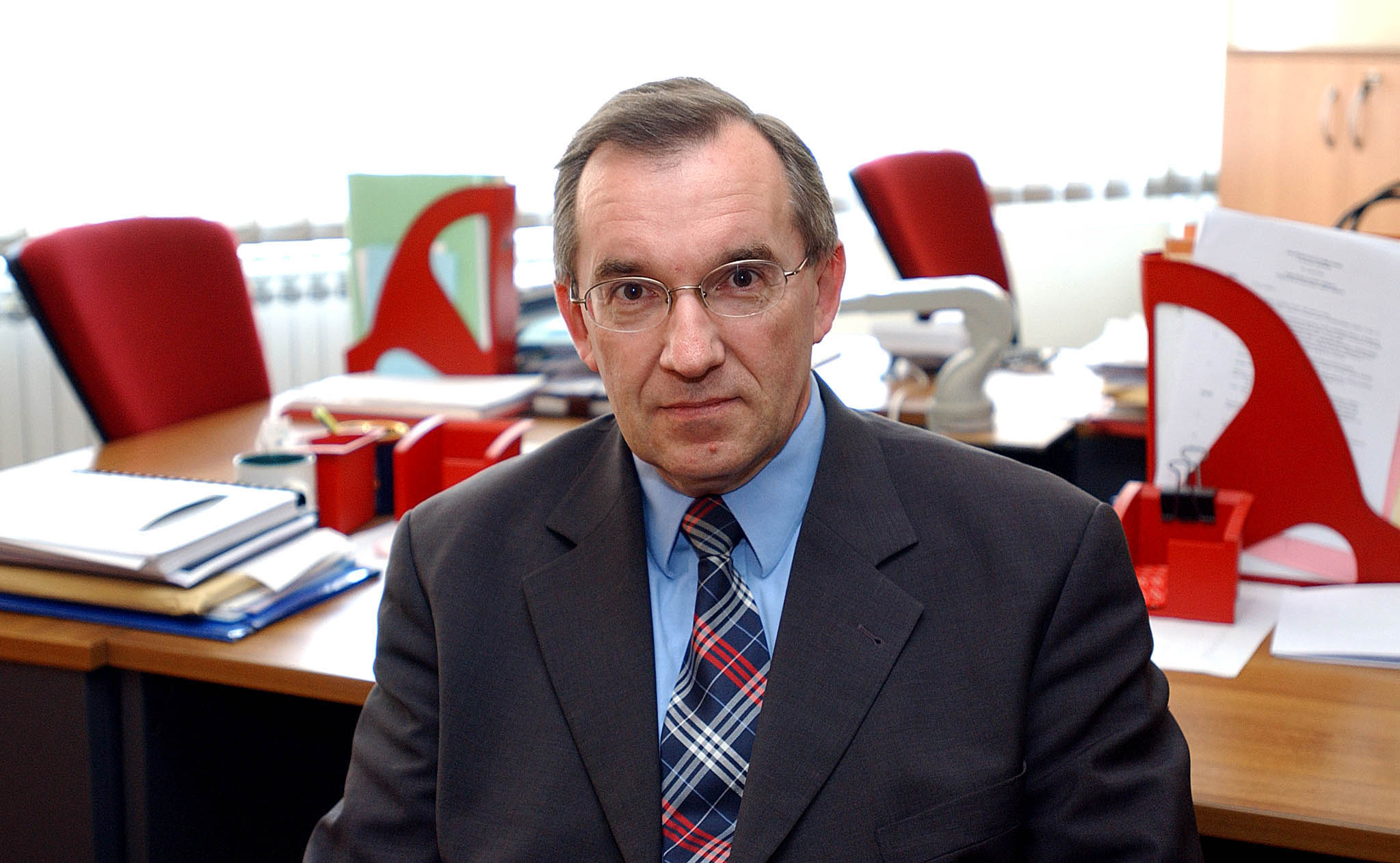 Dr. Ivan Grdesic, Foto: Nenad Reberšak